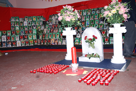 Maaveerarnaal2006-5.jpg, Germany Template:வார்ப்புரு:Cc-by-sa